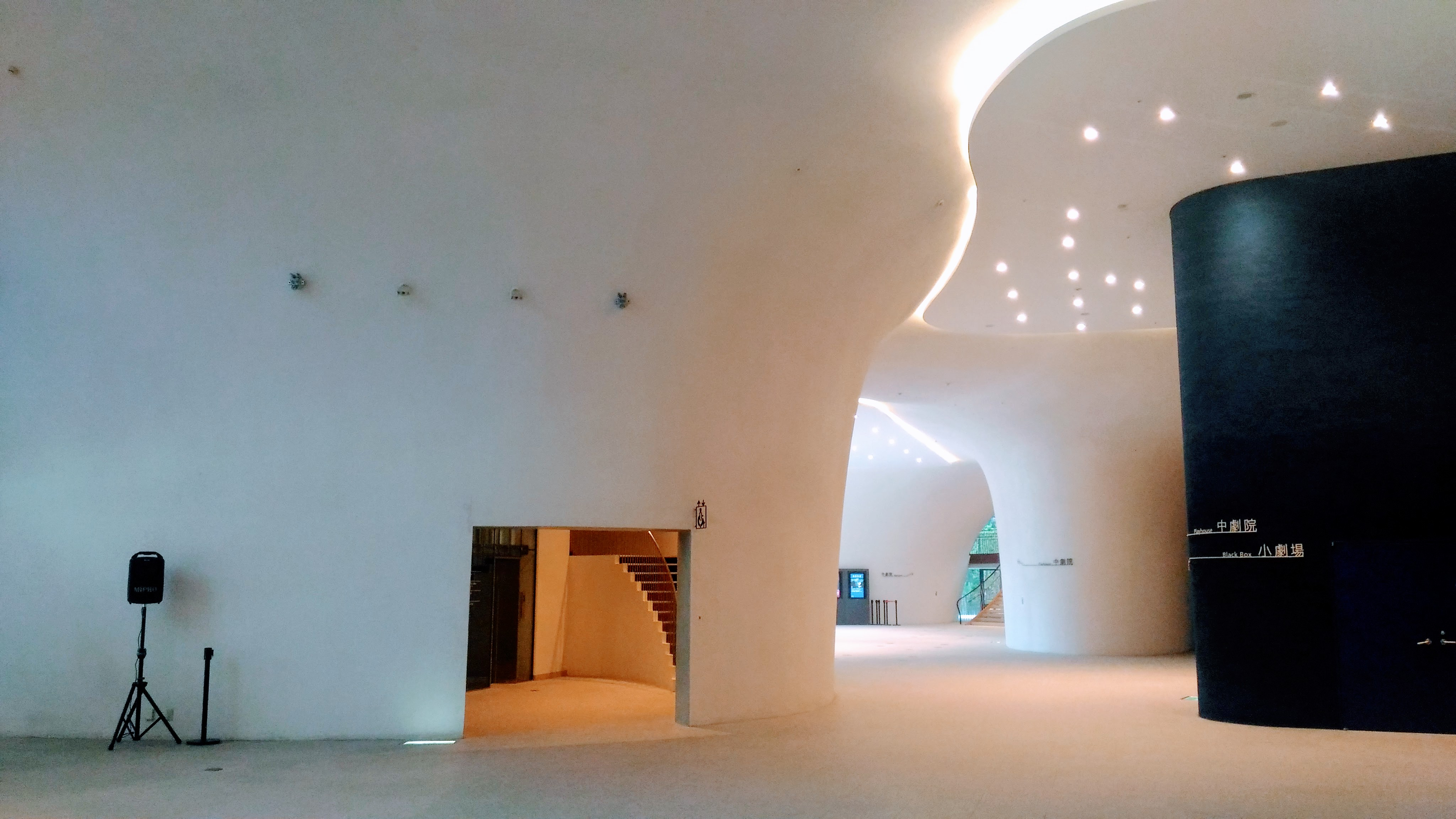 中文（台灣）: 位於台中市西屯區的國家表演藝術中心-臺中國家歌劇院是日本建築師伊東豊雄的作品，是台灣少有的數位建築作品。